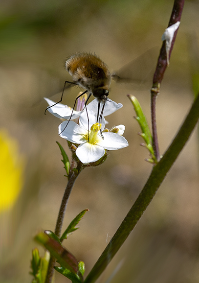 Bombyle butinant (Hérault)